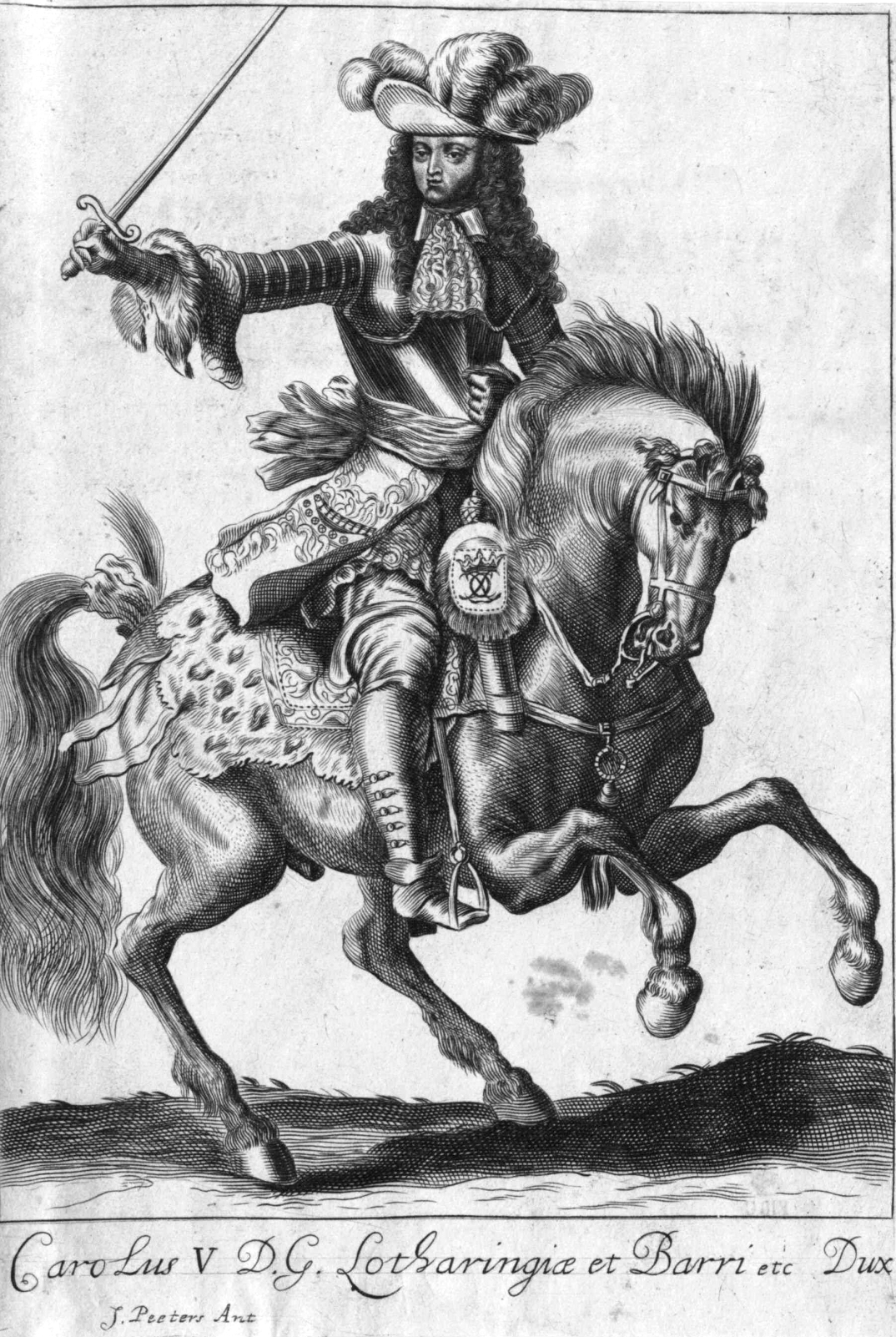 Lotharingiai Károly